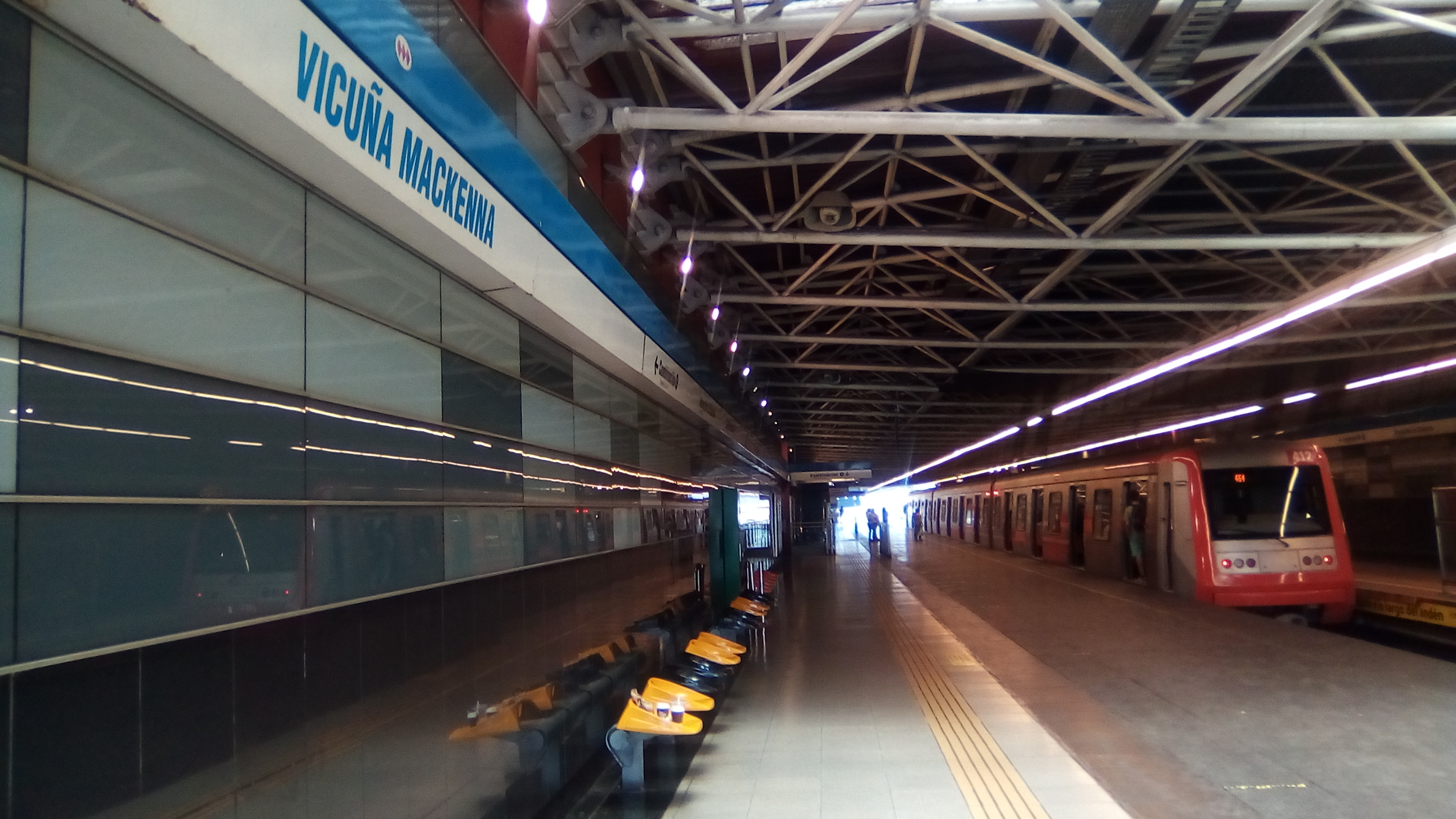 Estación Vicuña Mackenna L4A (2018)